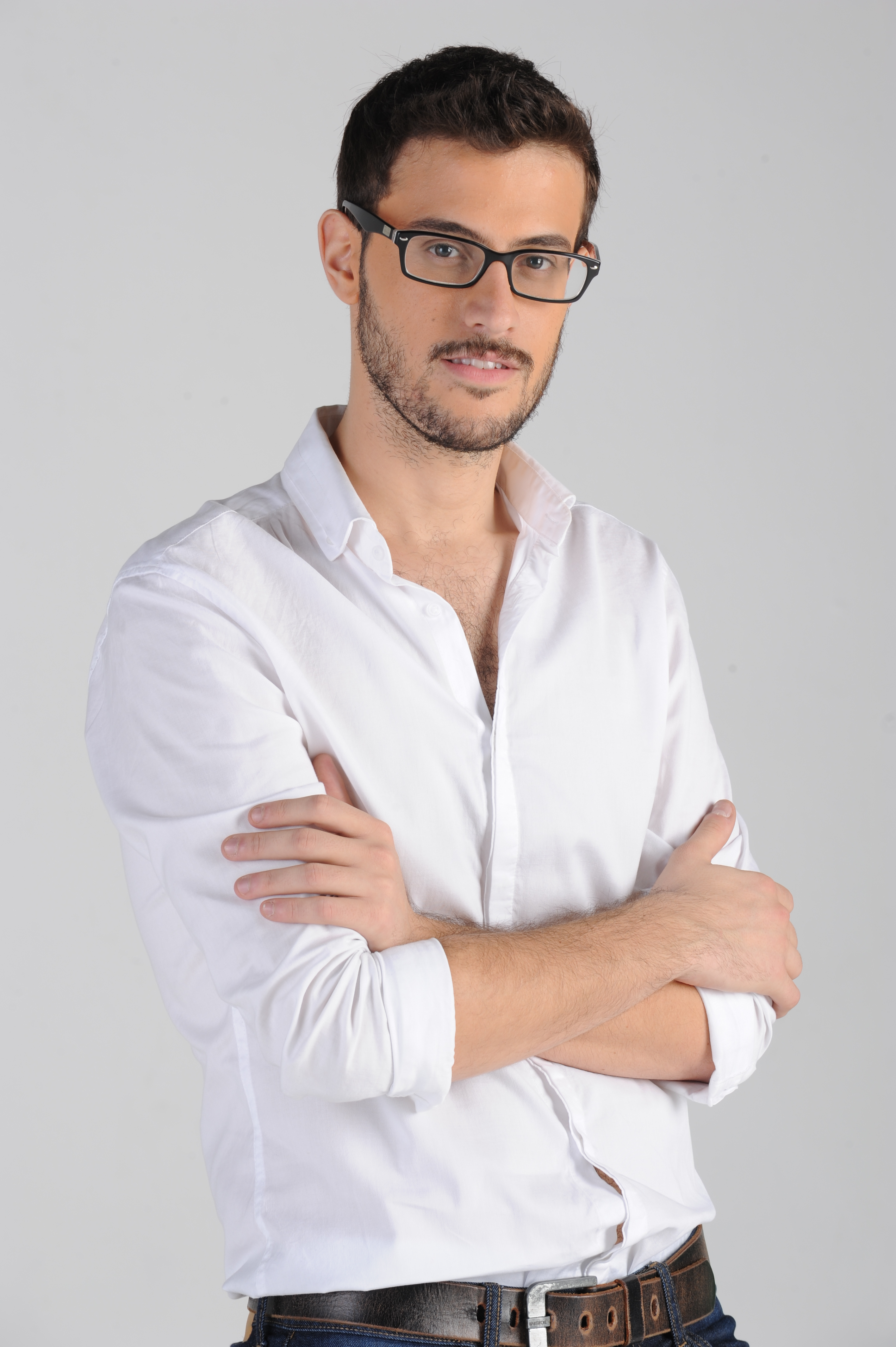 Diego Leuco en El Diario de Mariana